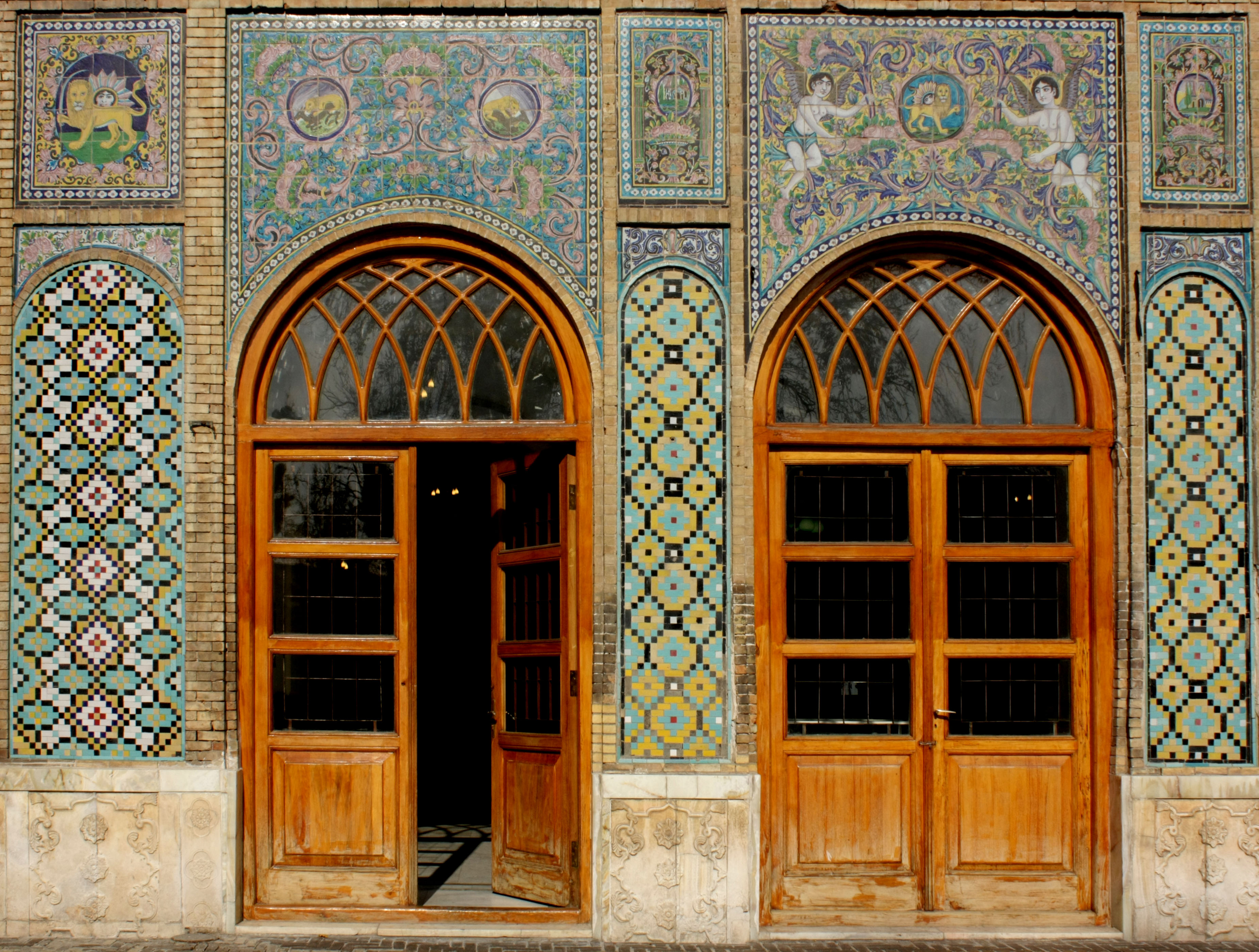 کاخ گلستان